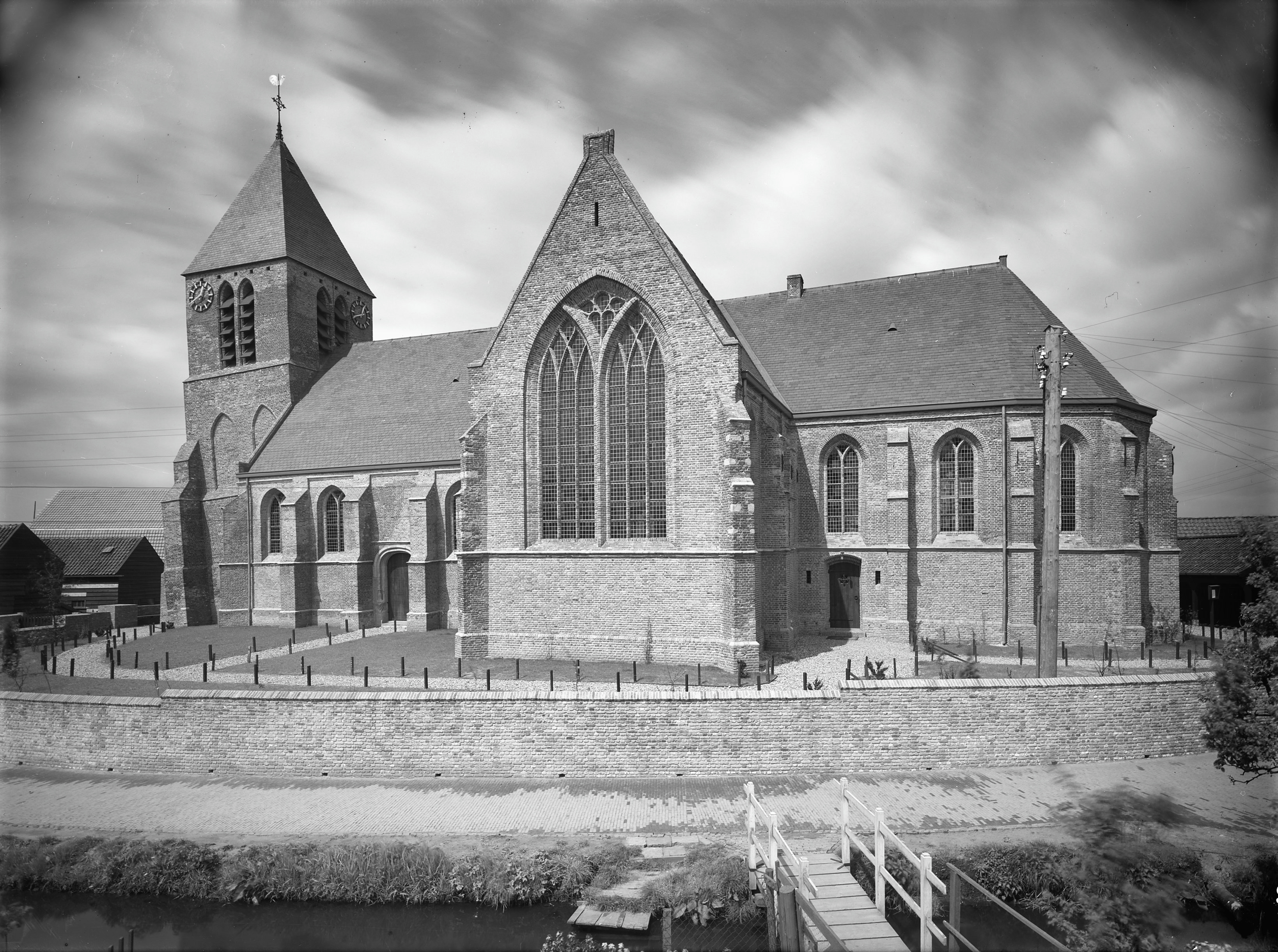 Nederlands Hervormde Kerk: kerk vanuit het zuid-oosten